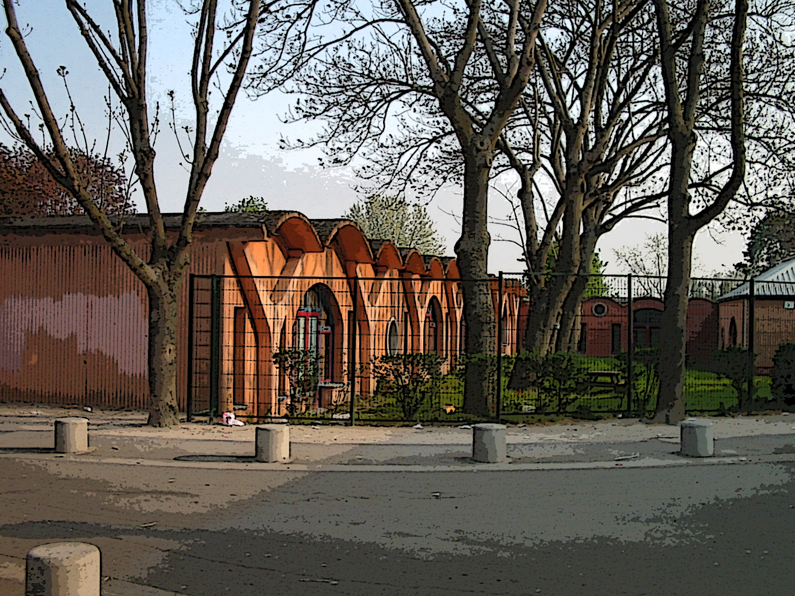 France - Ile-de-France - Essonne - Grigny - La Grande Borne - Ecole du Buffle